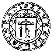 Sigill för Älvdals härad, Värmland